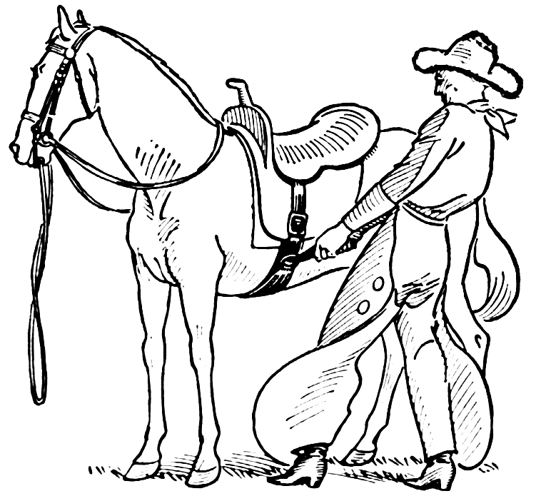 en=Girth;de=Sattelgurt